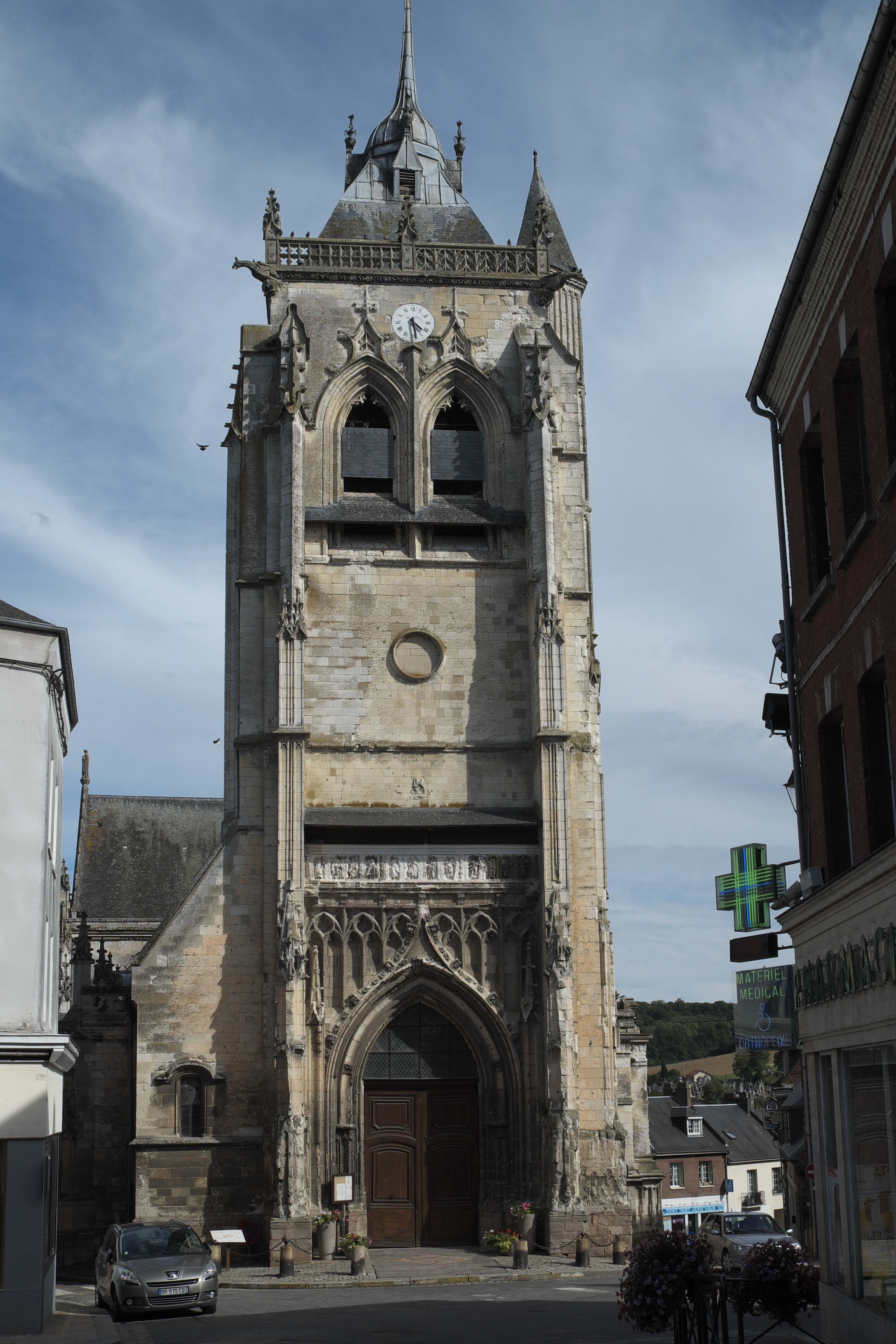 Katholische Kirche Saint-Pierre und Saint-Paul in Aumale im Département Seine-Maritime (Haute-Normandie/Frankreich), Glockenturm von 1562